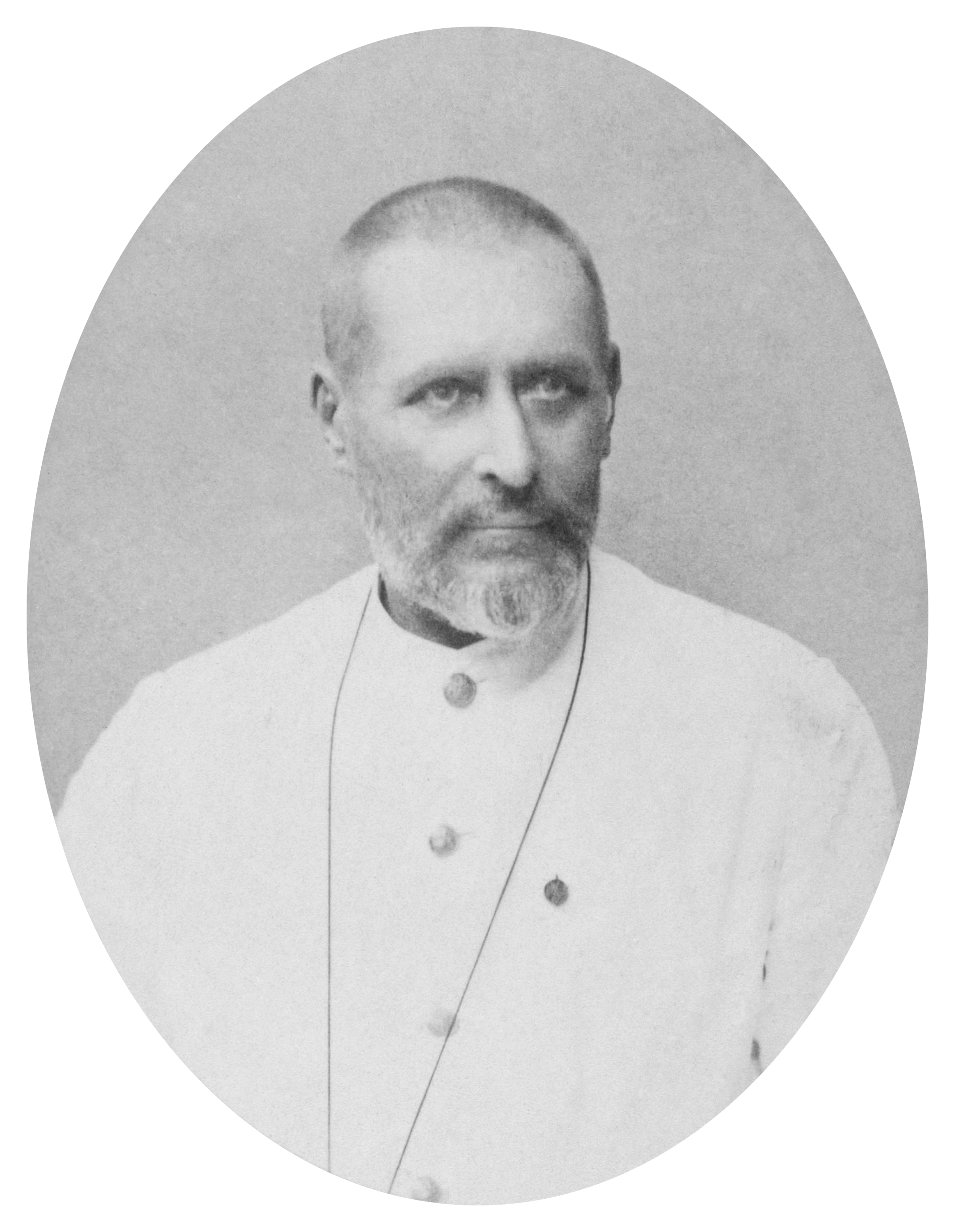 Paul Emile Marie Réveillere